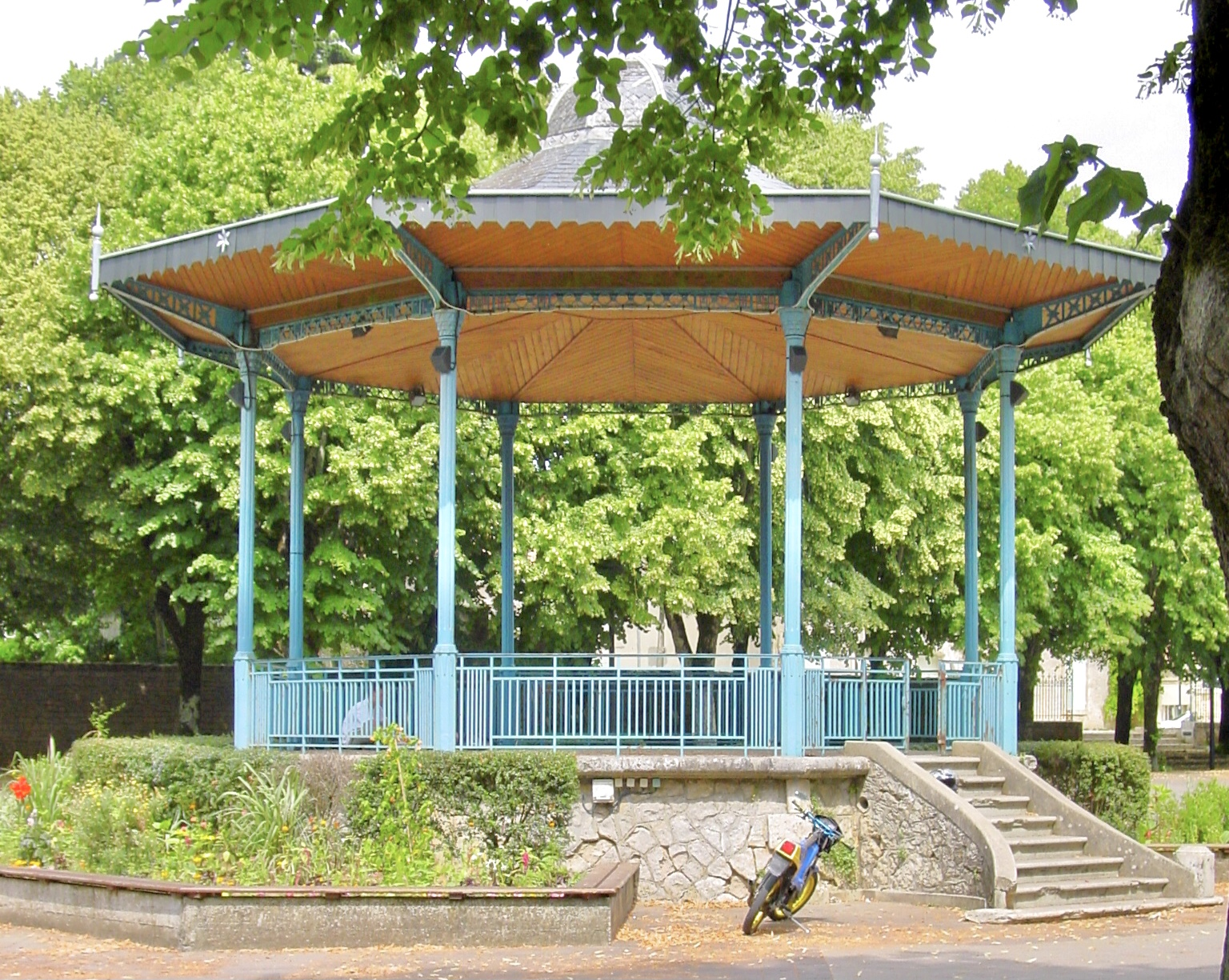 Kiosque à musique métallique Art Déco, construit en 1930 sur la place Bugeault à Melle